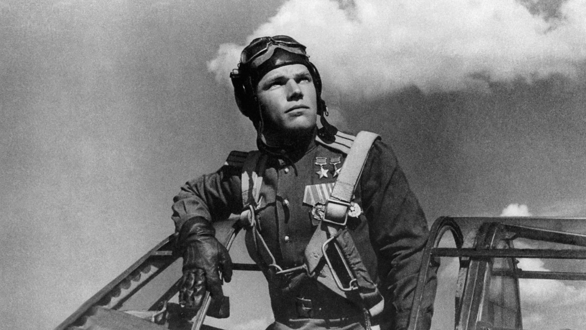 Иван Никитович Кожедуб (1920 — 1991) — советский военачальник, лётчик-ас.